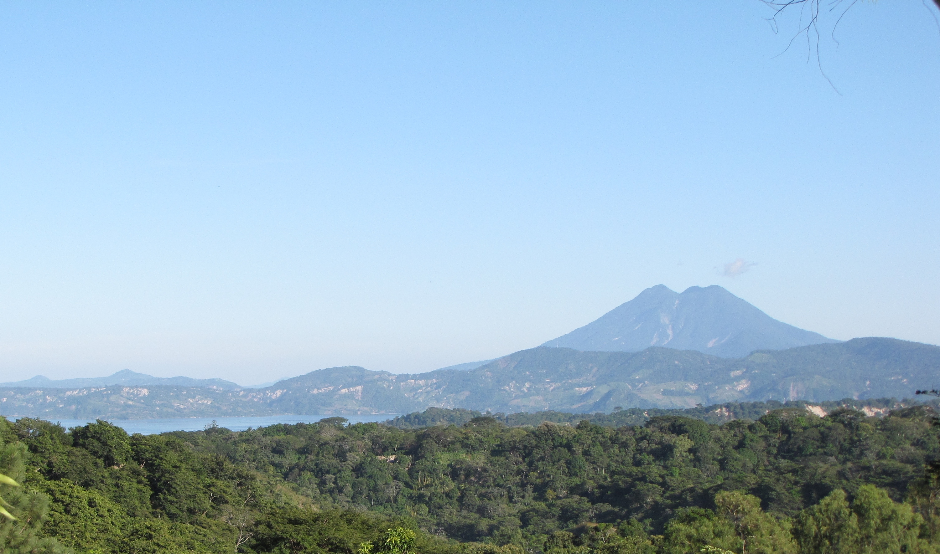 Volcan de San Vicente y lago de Ilopango.